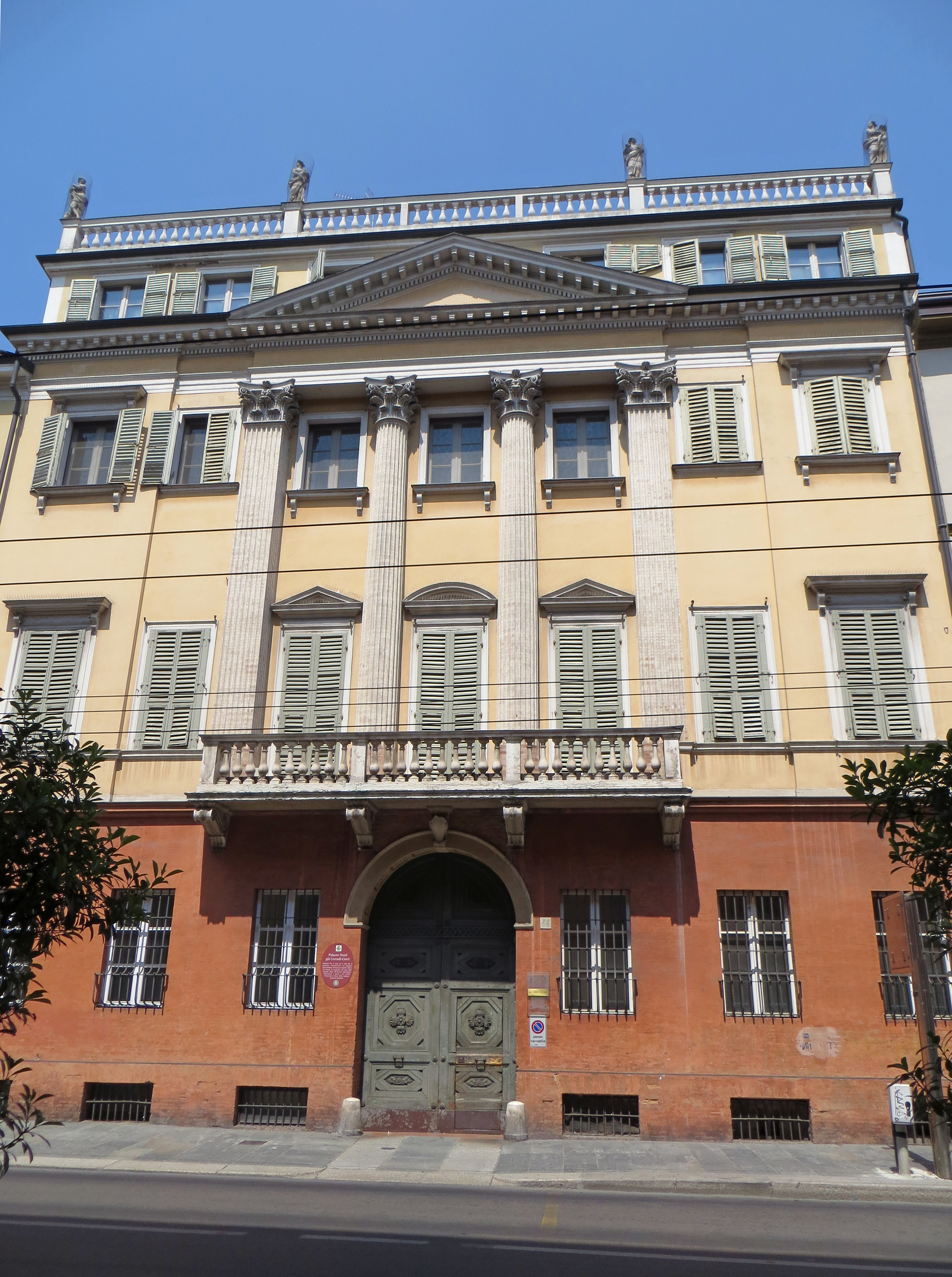 Palazzo Dazzi (Parma) - facciata